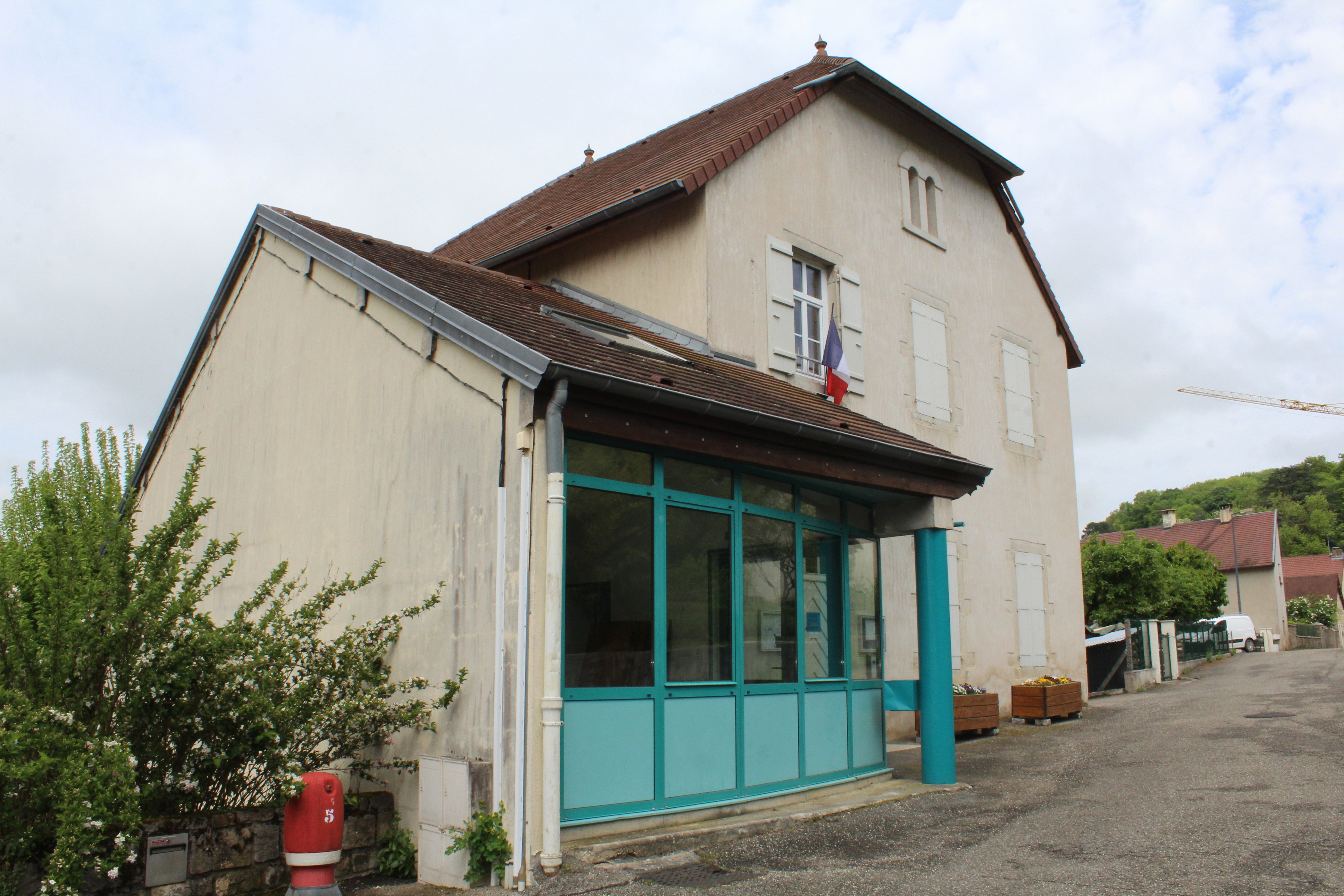 Mairie de Chille.